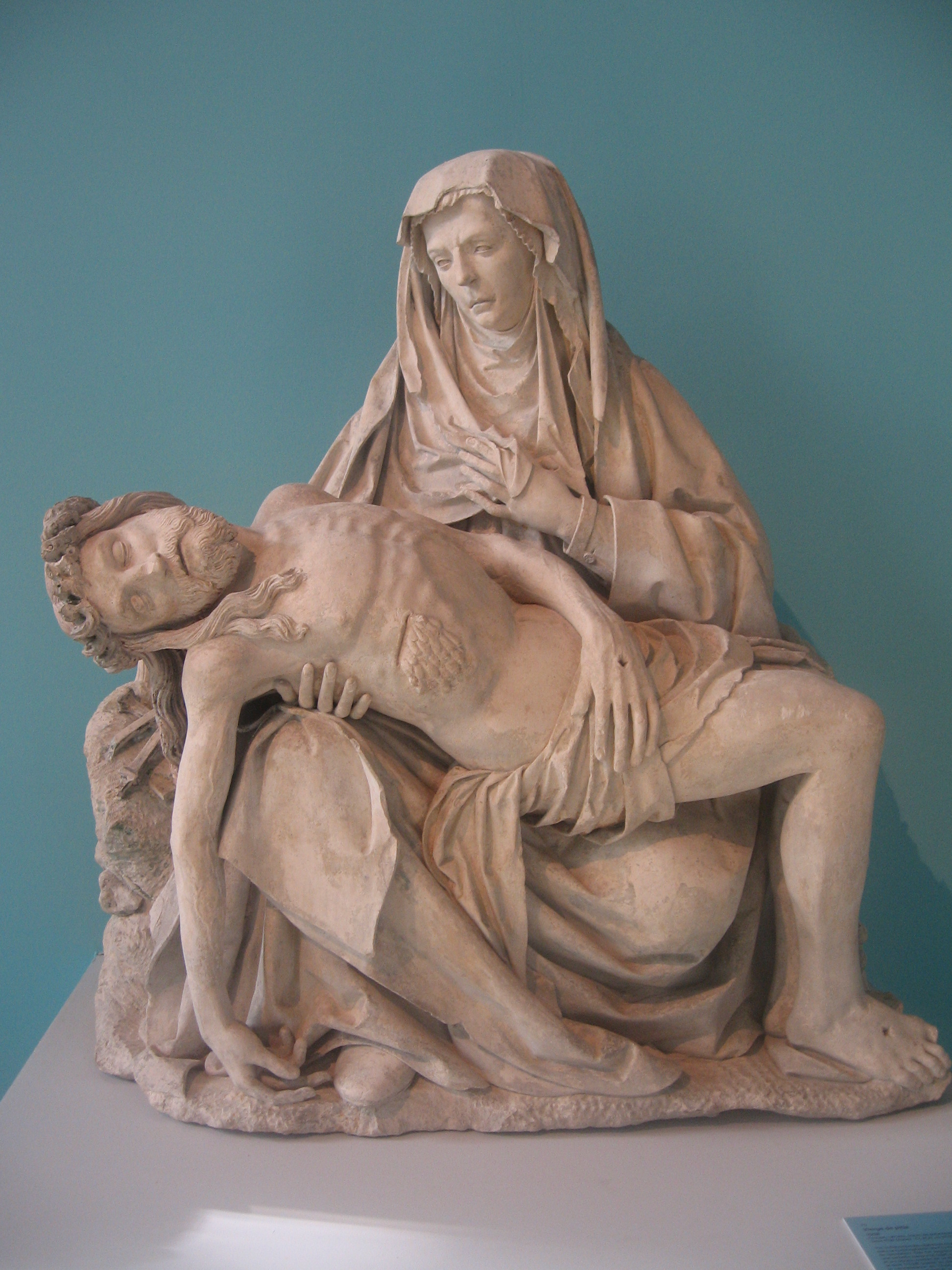 Exposition "Le Beau XVIe siècle". Vierge de Pitié 1508. Groupe, calcaire, polychromie. Saint-Phal (Aube) - Classé Monument historique le 18.02.1908